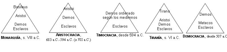 Grecia fue la civilización donde de manera más consciente los políticos se esforzaron por conseguir un gobierno justo y equitativo para todos los ciudadanos. En concreto, brilló por su genio político la polis o ciudad-Estado de Atenas. En la imagen, cronológicamente ordenadas, la sucesión de regímenes de la ciudad-Estado de Atenas que llevaron desde una monarquía o diarquía (sistema común en Oriente Próximo en el siglo VII antes de Cristo), hasta la Constitución democrática de Clístenes (510-507 a.C.). Entre Monarquía y Democracia, los atenienses experimentaron la Aristocracia, la Oligarquía o Timocracia de Solón y la Tiranía (asociada en Atenas al nombre de Pisístrato y los Pisistrátidas). Este vocabulario para designar regímenes políticos que proviene de la Antigua Civilización Griega pervive en la actualidad con casi los mismos significados